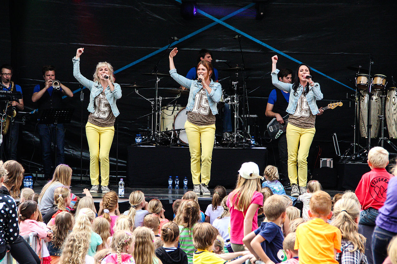 K3 Alles Kids à Drenthe 2014